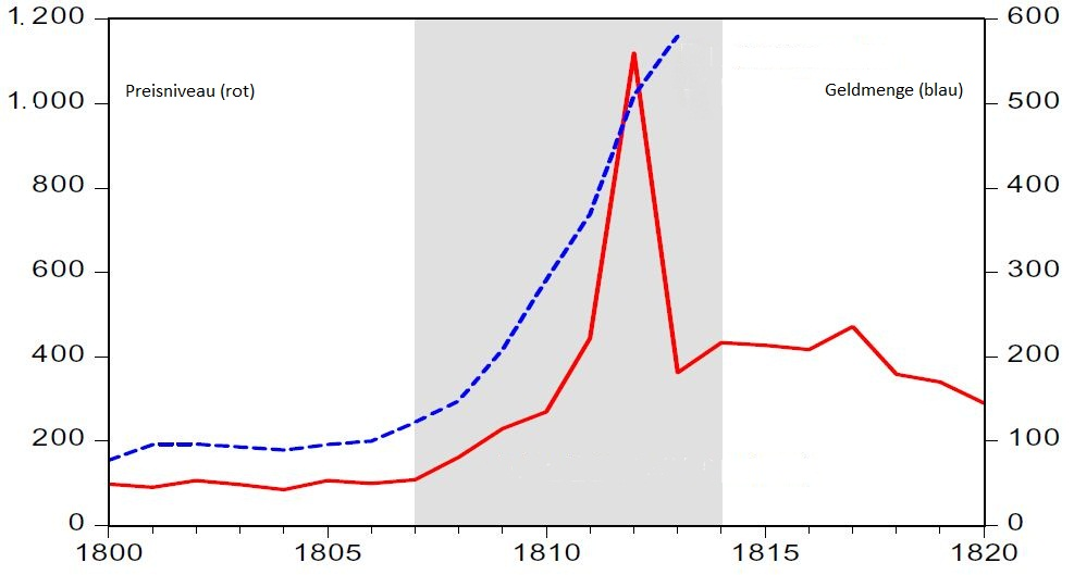 Inflation in Norwegen 1813-1816. Die Geldmenge verfünffachte sich, die Preise verelftfachten sich.